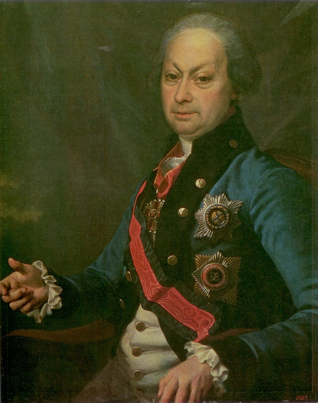 Мельгунов, Алексей Петрович, ярославский и вологодский генерал-губернатор, в дворянском мундире ярославского или вологодского наместничества.